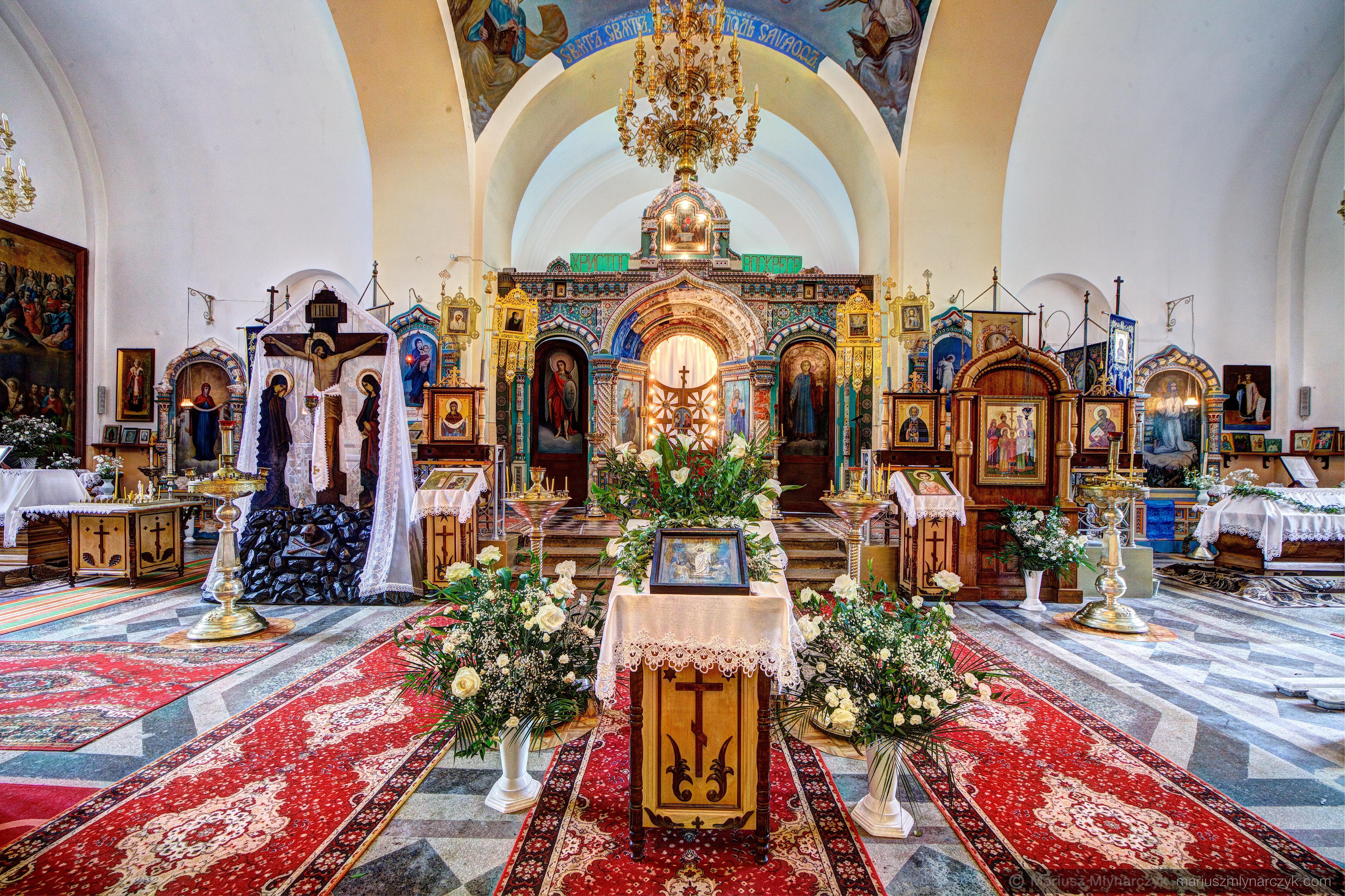 Ołtarz w Cerkwi Św. Mikołaja w Białowieży